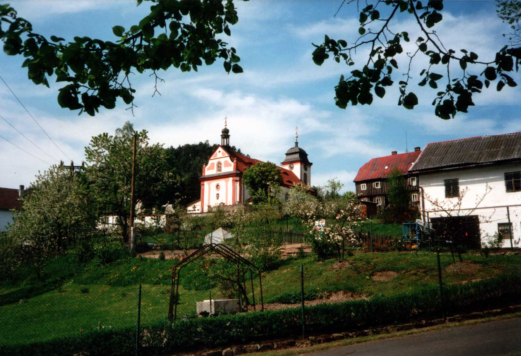 Kostel sv. Jana Nepomuckého v Jetřichovicích, okres Děčín.